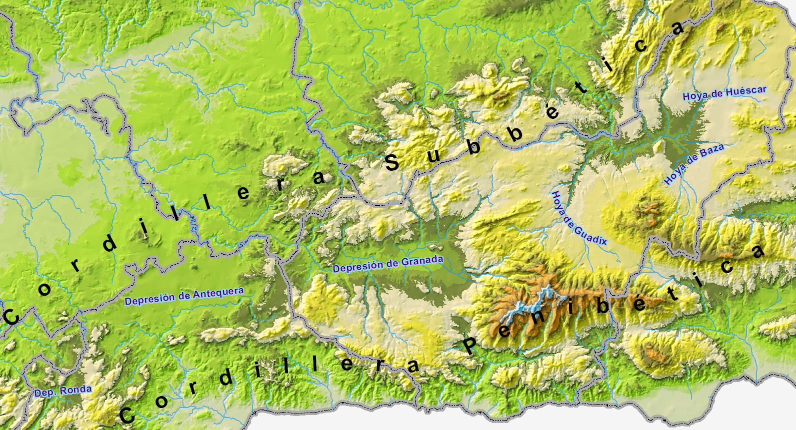 Localización del Surco Intrabético